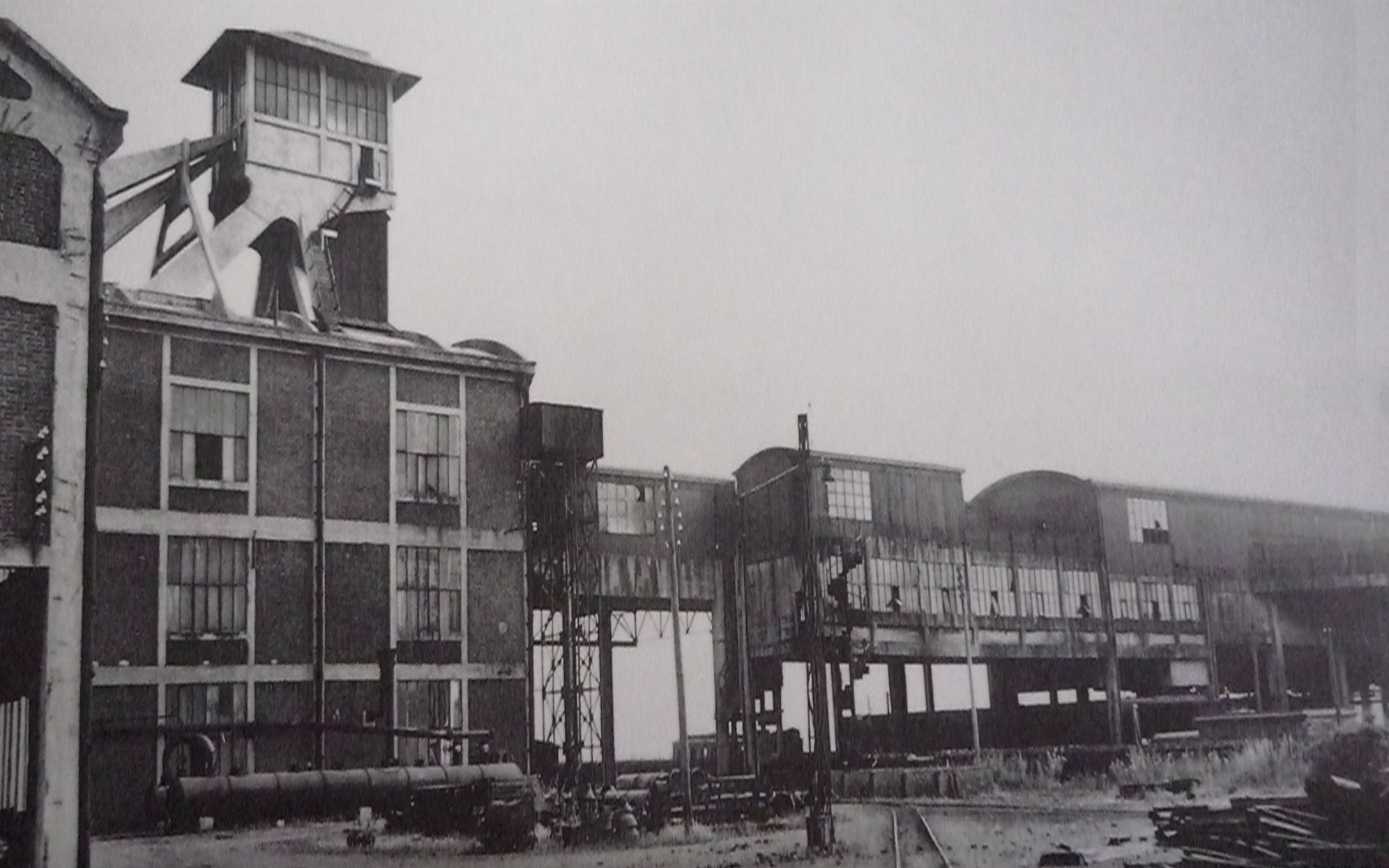 La Fosse n° 4 de la Compagnie des mines de Béthune était un charbonnage constitué d'un seul puits situé à Vermelles, Pas-de-Calais, Nord-Pas-de-Calais, France.